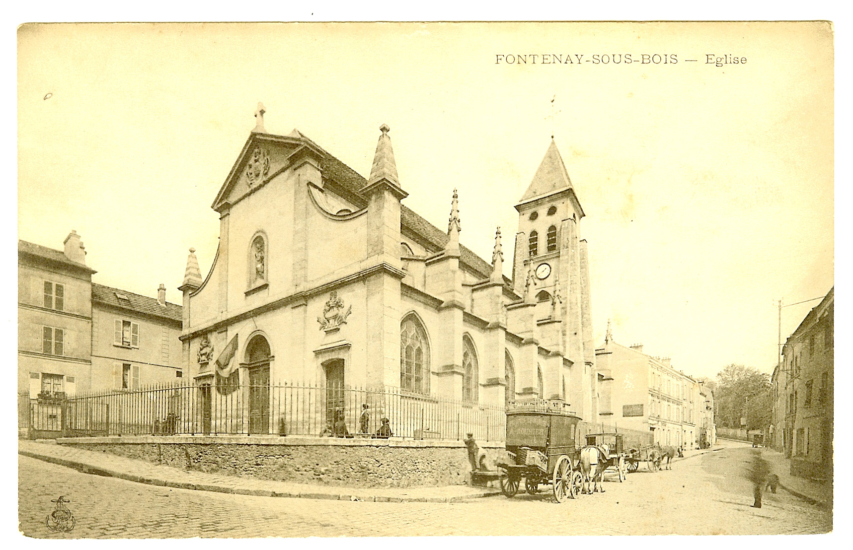 Eglise de Fontenay-sous-Bois